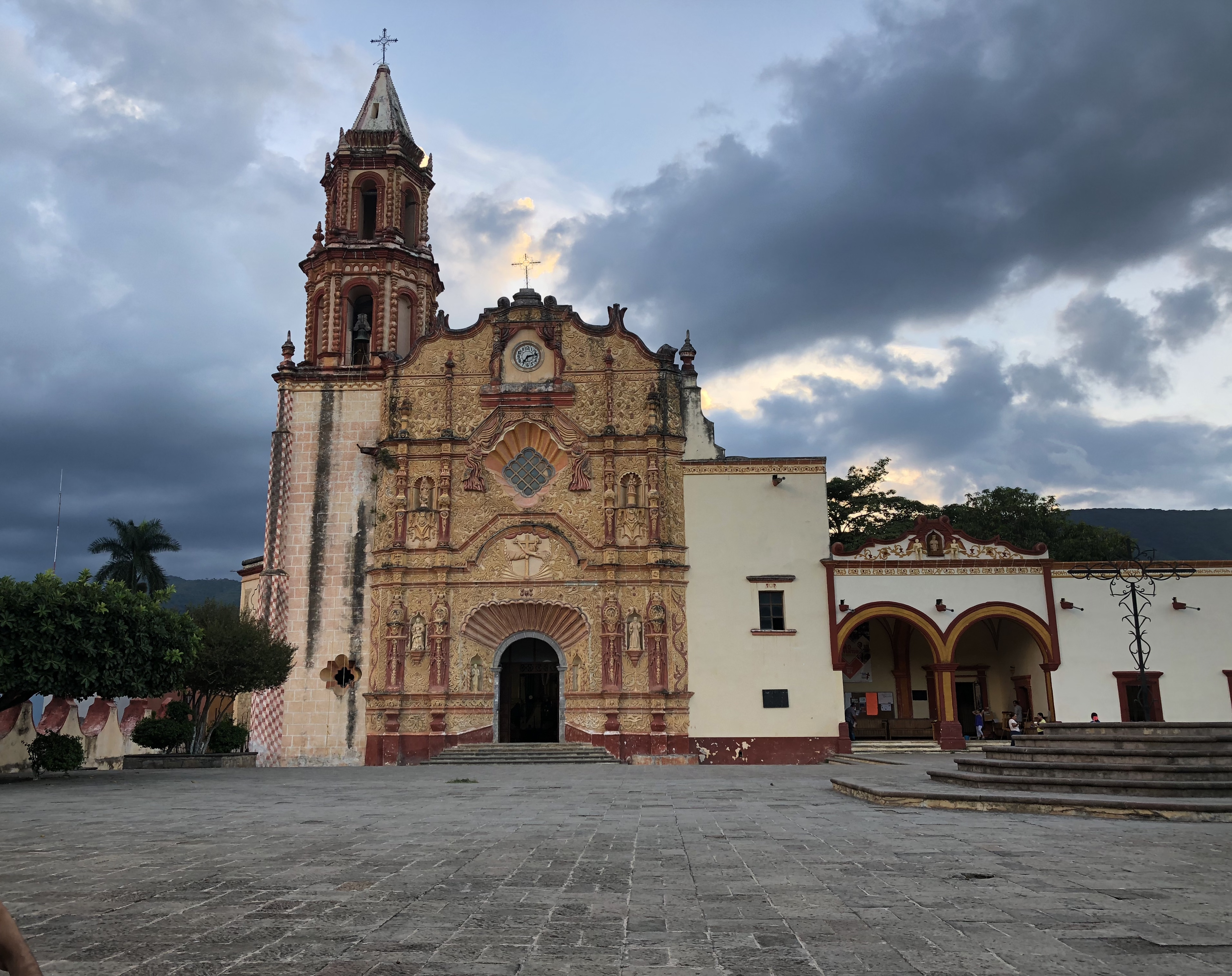 Vista de la Misión Santiago de Apostol de forma frontal